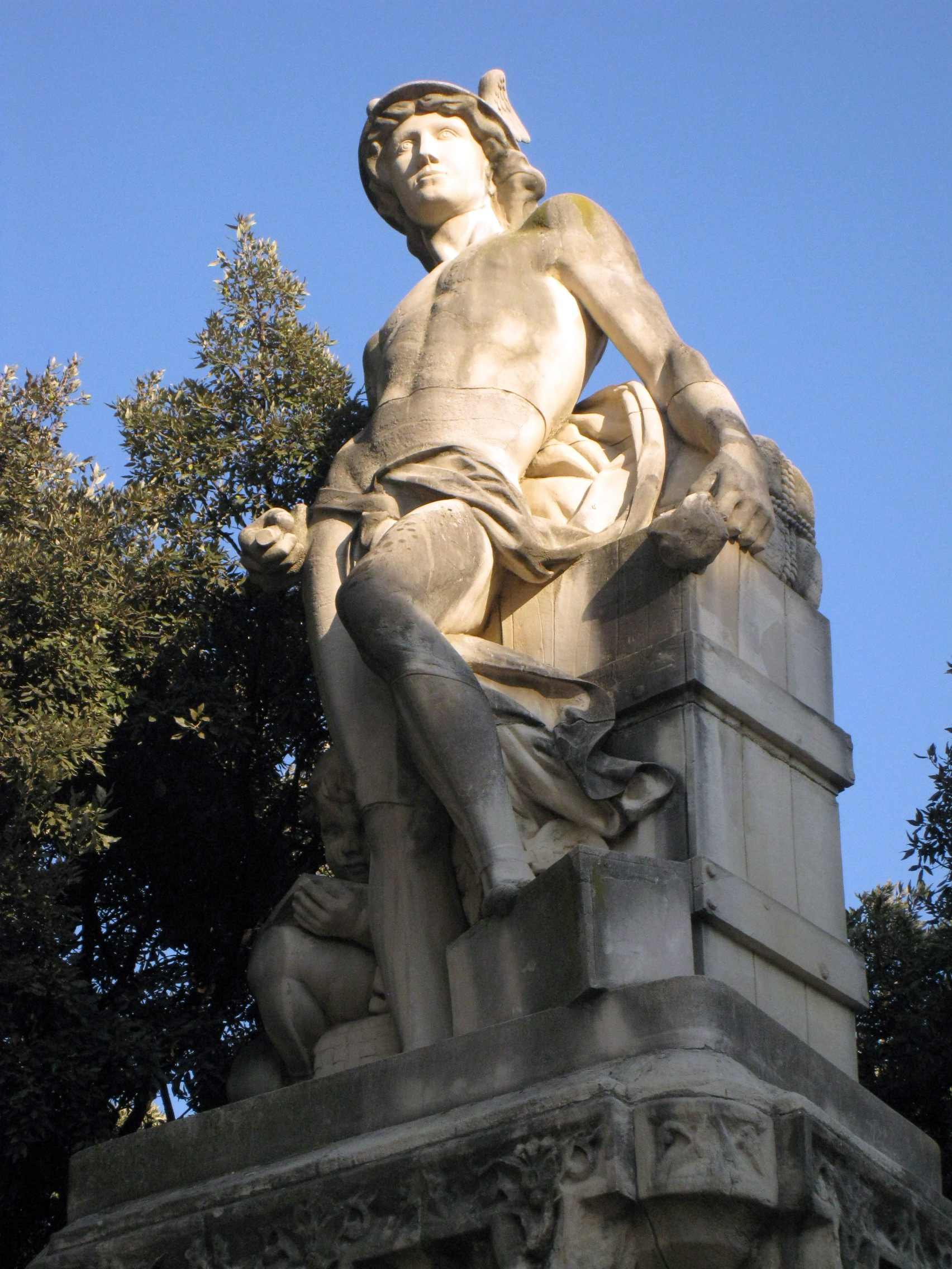 Al·legoria del Comerç, d'Agapit Vallmitjana, a la porta d'accés al parc de la Ciutadella pel passeig de Vilanova (Barcelona)